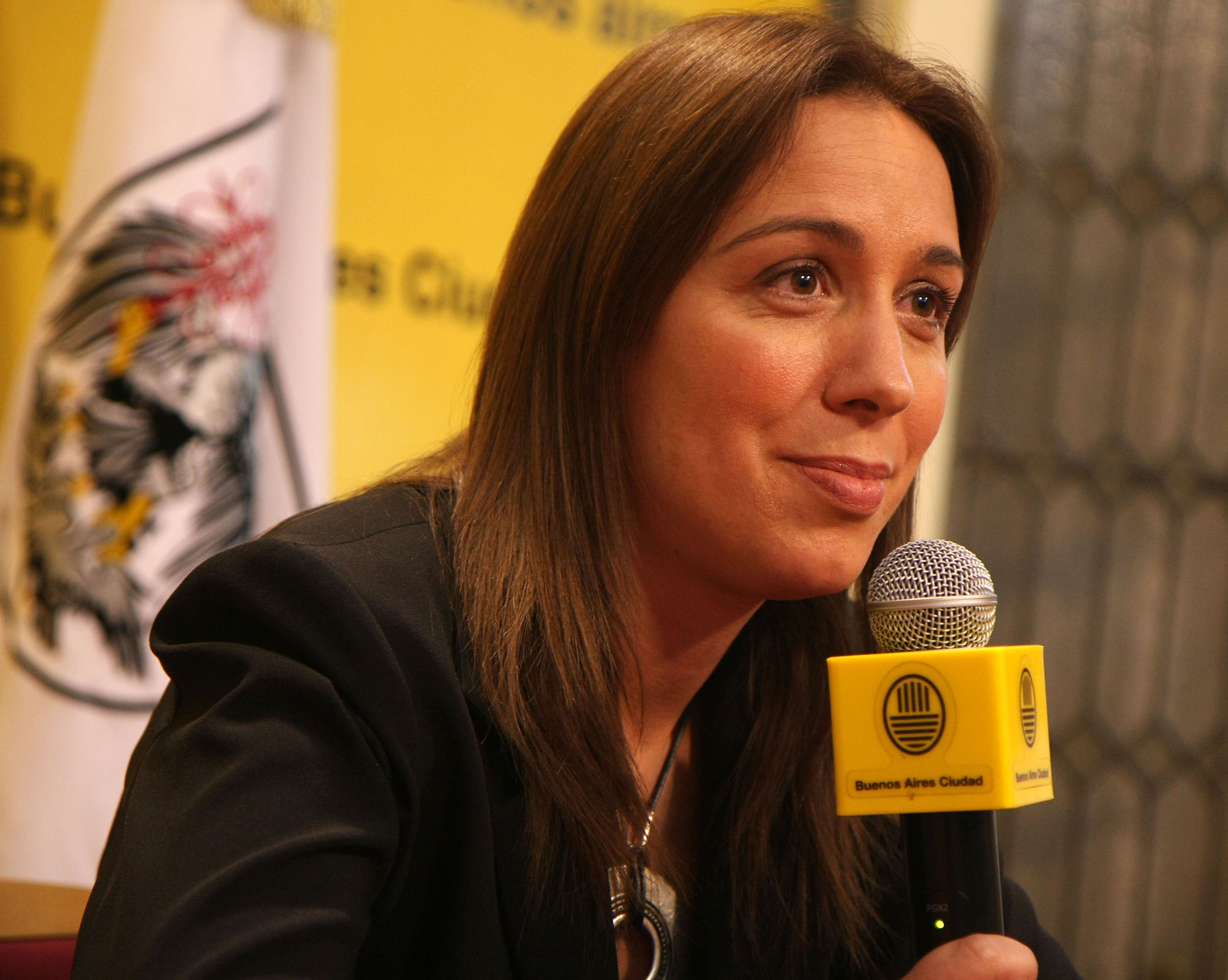 Buenos Aires, 23 de noviembre de 2011 La vicejefa electa del Gobierno de la Ciudad de Buenos Aires, María Eugenia Vidal, y los ministros de Ambiente y Espacio Público, Diego Santilli, y de Hacienda, Néstor Grindetti, ofrecieron una conferencia de prensa al término de la reunión de Gabinete semanal que se realizó esta mañana en el Salón de Acuerdos del Palacio Municipal. Foto: Sandra Hernández/GCBA